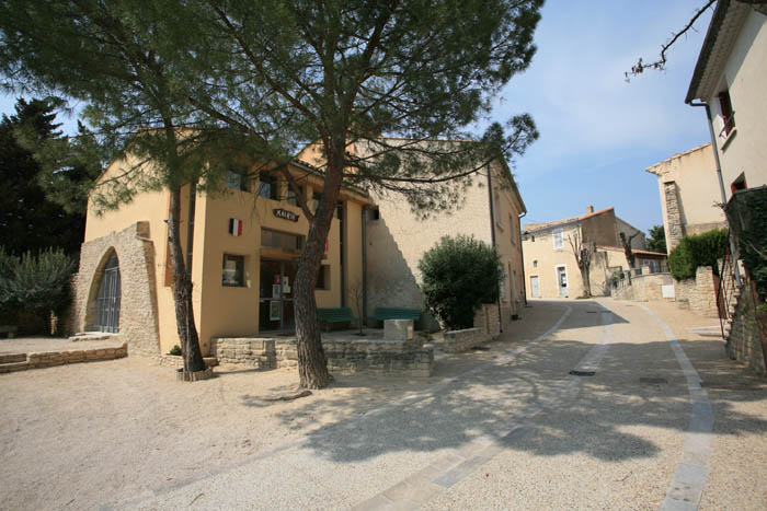 Village of Modène in Vaucluse, France